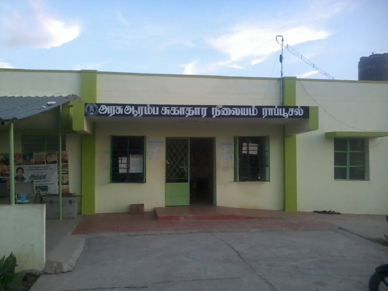 PHC, Rappusal